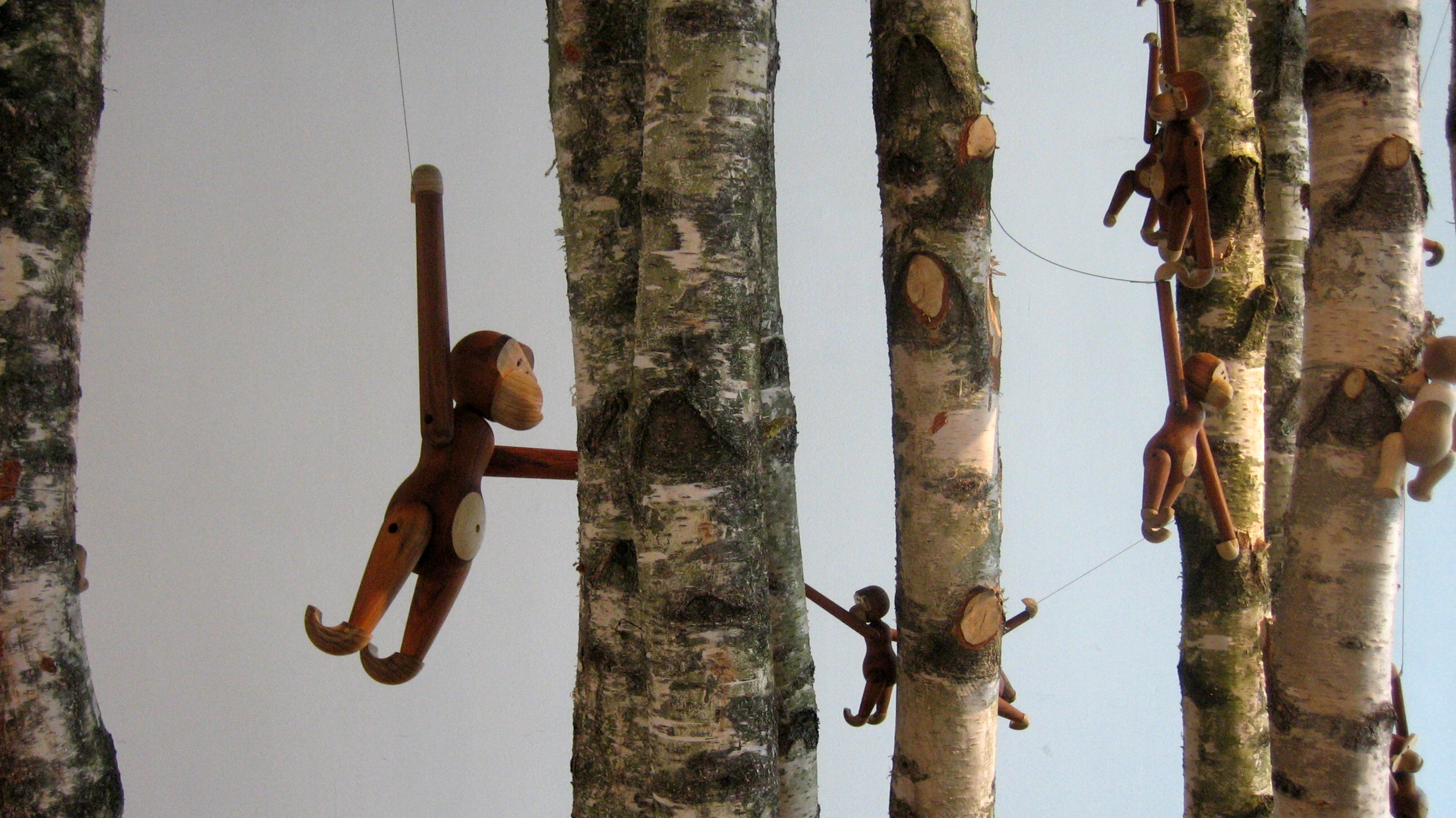 Kay Bojesen's wooden monkey at display in Danish Design Center in Copenhagen, Denmark